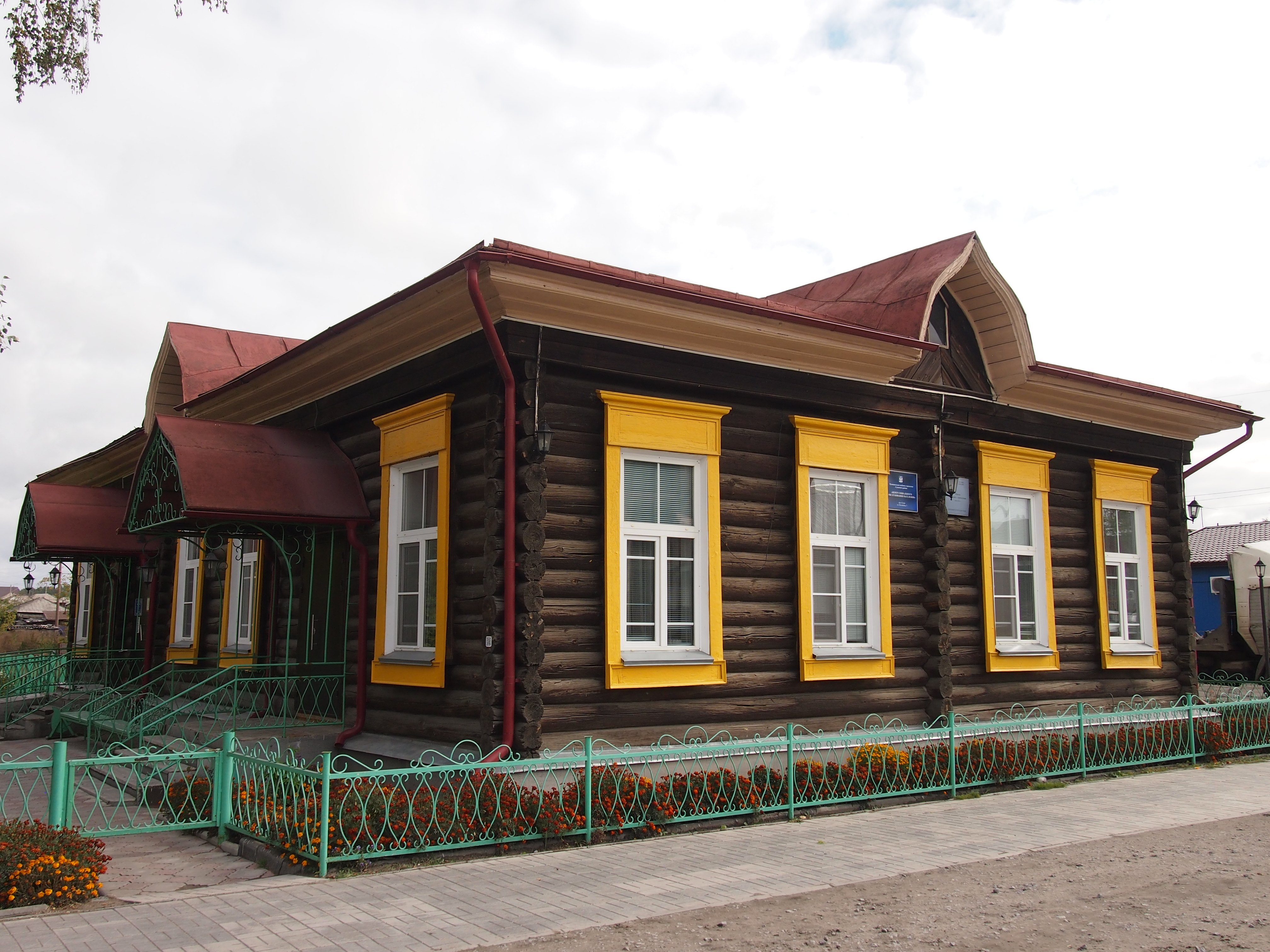 Школа церковно-приходская: улица Калинина, 7, Сузун, Сузунский район, Новосибирская область